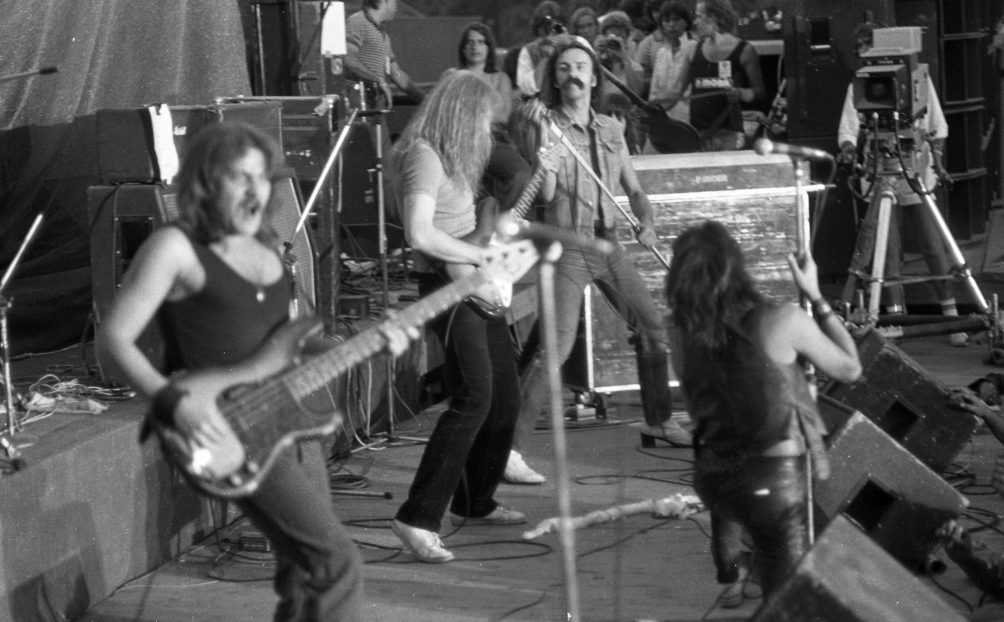 Népkerti pálya, Jubileumi Rockfesztivál, P. Mobil együttes. Location: Hungary Tags: stage, microphone, musical instrument, guitar, television camera, Hungarian TV, beat era Title: Népkerti pálya, Jubileumi Rockfesztivál, P. Mobil együttes.